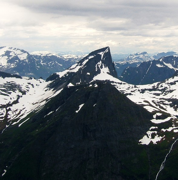 Own work. Summer 2005 Jakta seen from Slogen in Sunnmørsalpene, Norway